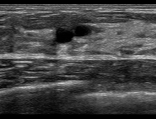 Mamma cyst